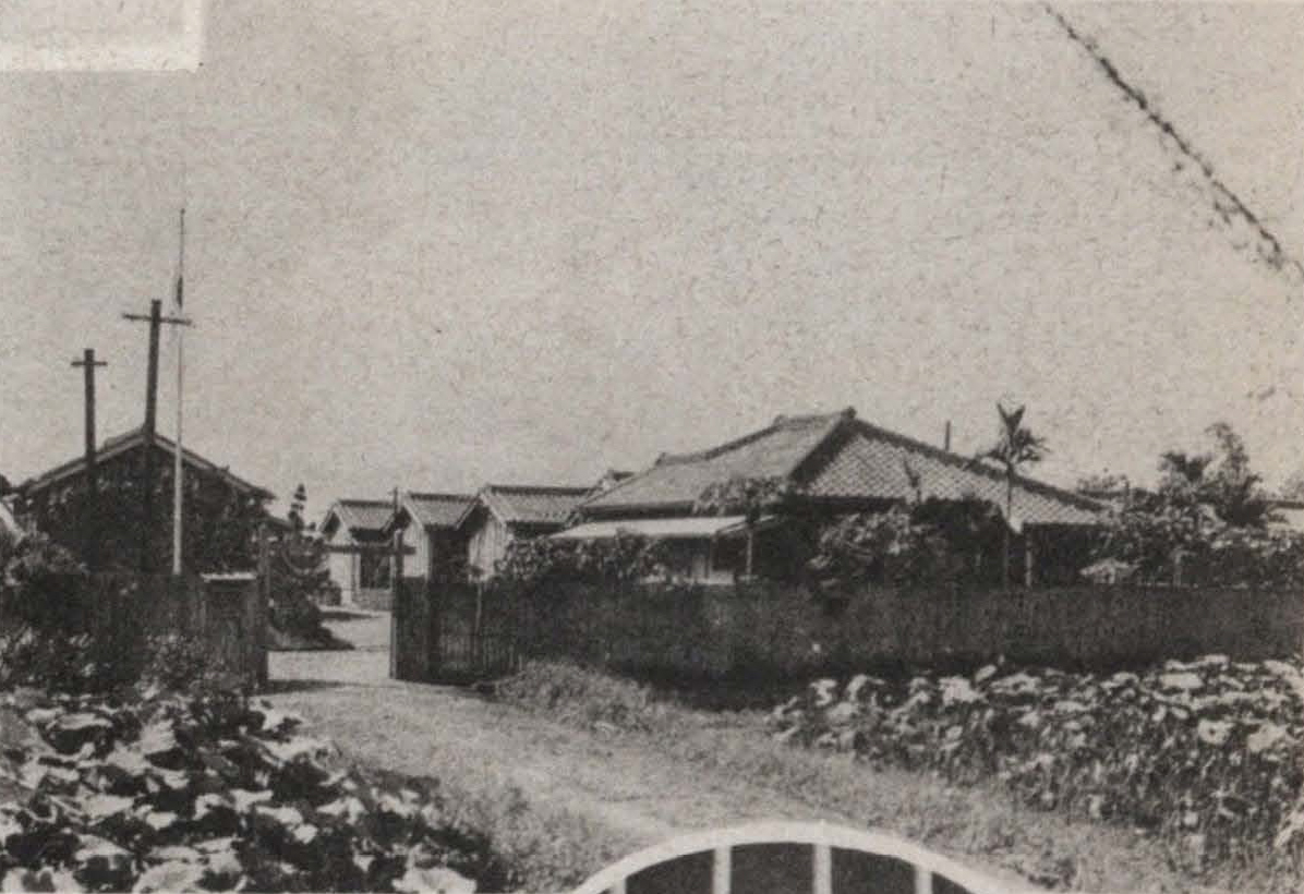 中文（台灣）: 臺北市共同住宅又稱為樂樂莊，為供獨居高齡者出租居住之住宅，位於堀江町，計有8棟32戶。